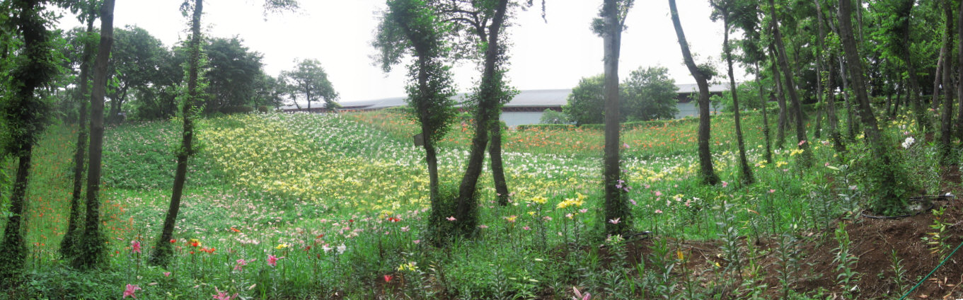 埼玉県所沢市の旧ユネスコ村にある「ゆり園」。通年5月中旬～7月中旬のみに営業。